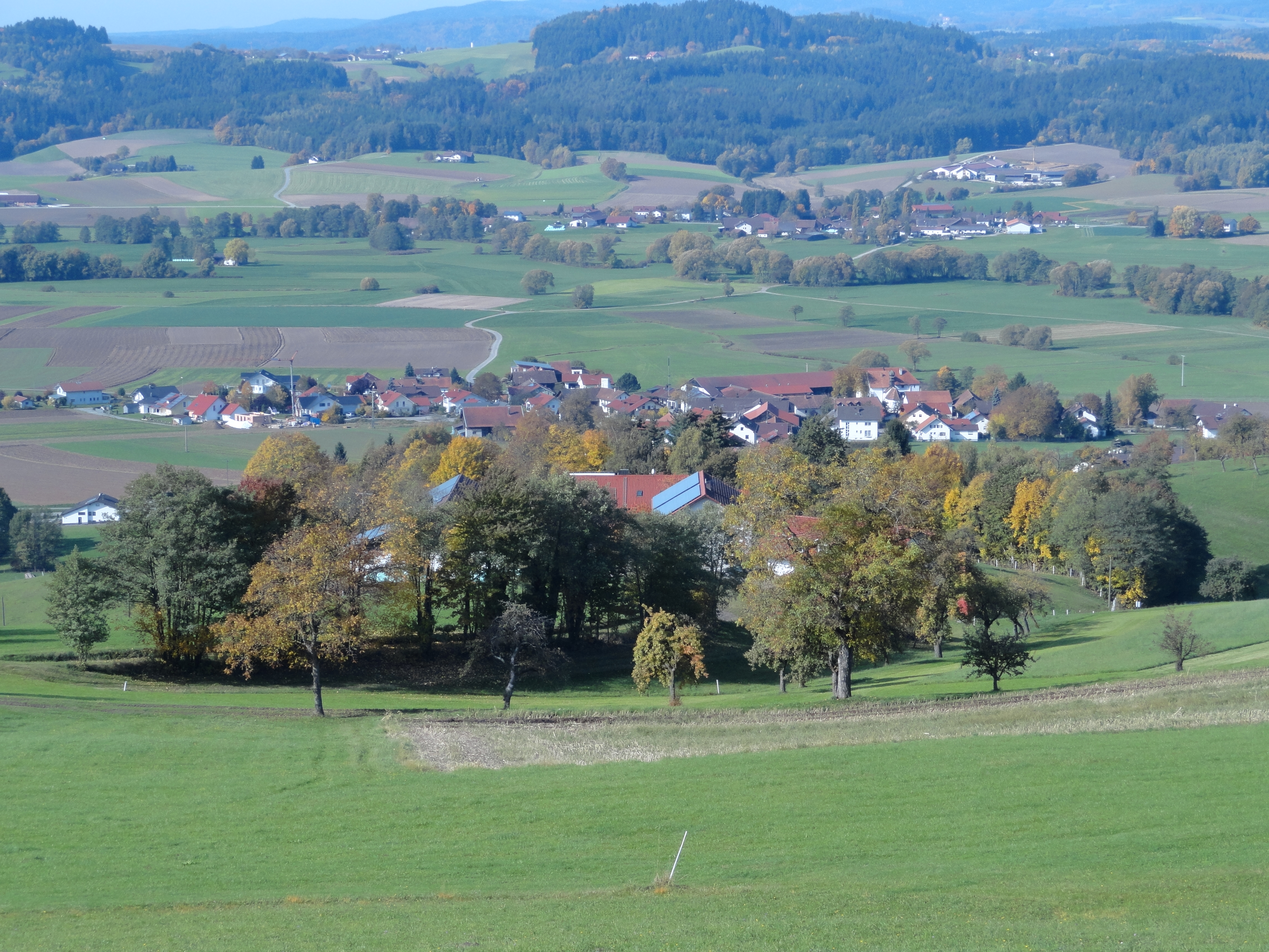 Hunderdorf, Ortsteil Au vorm Wald, von Unterbucha aus aufgenommen; Im Vordergrung Brandstatt